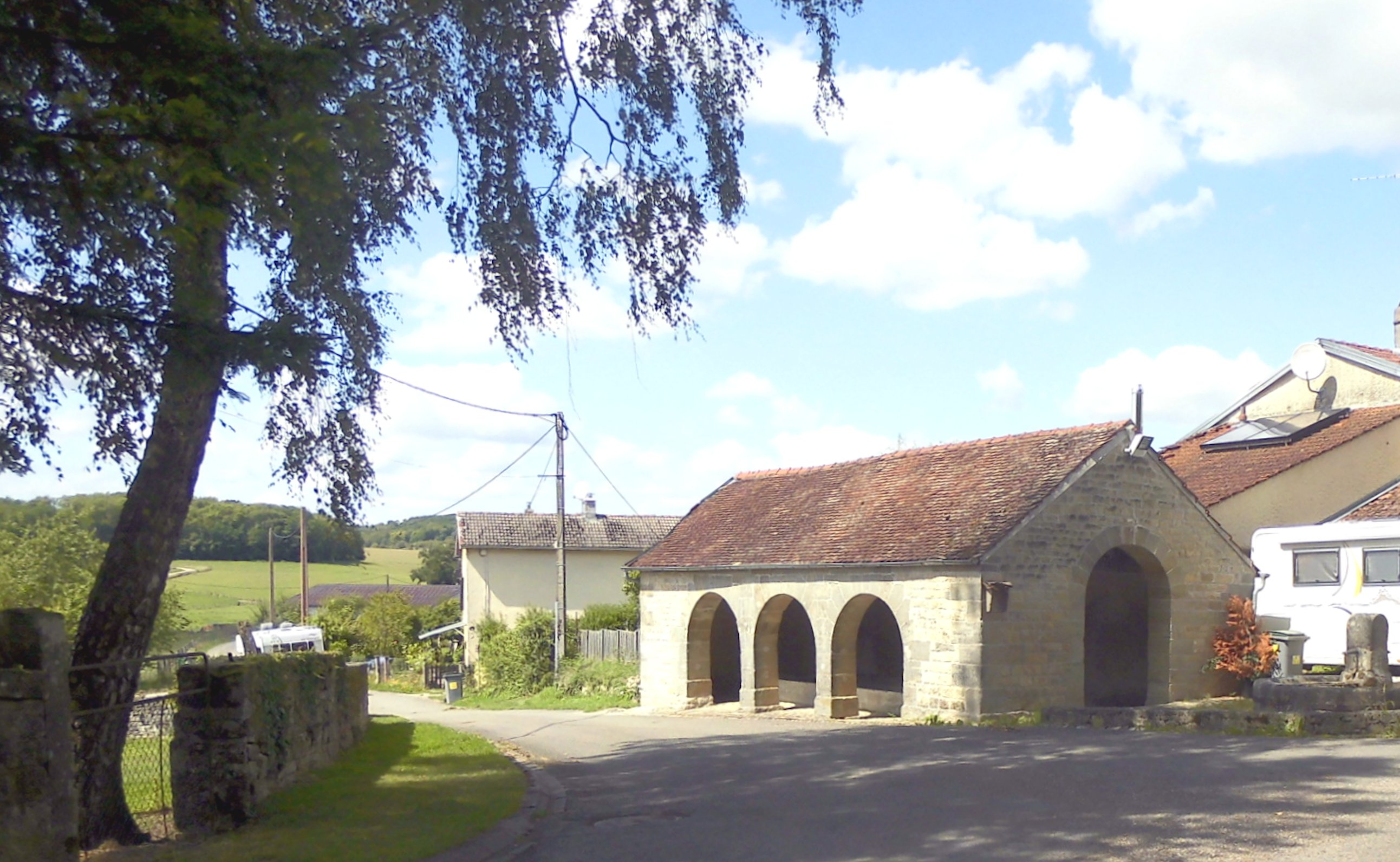 Lavoir d'Aisey, cpmmune d'Aisey-et-Richecourt